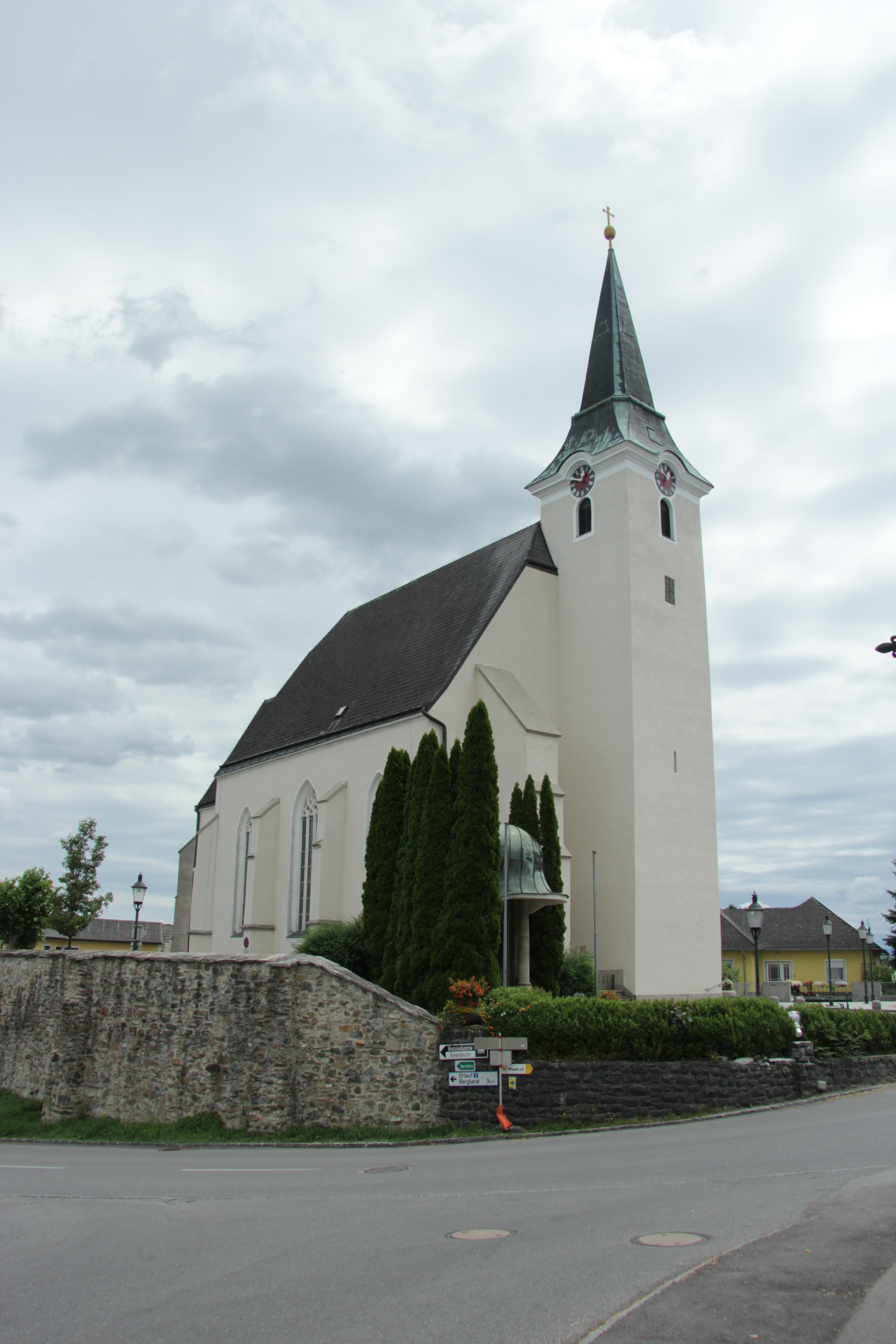 Kath. Pfarrkirche hl. Stephan